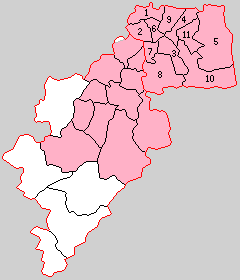 島根県大原郡の町村制時点の町村。